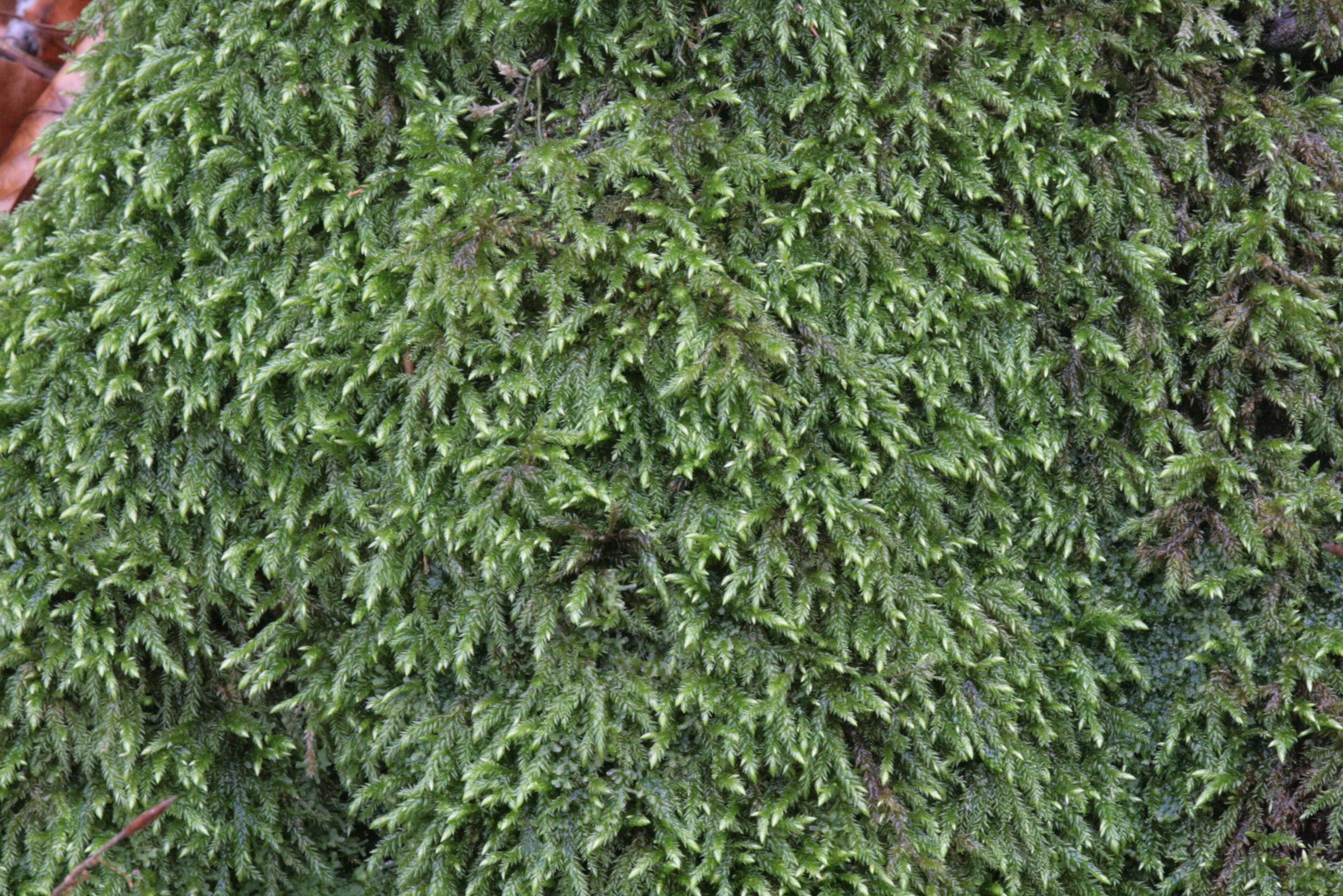 Isothecium alopecuroides, Umgebung Hollenstein an der Ybbs, Niederösterreich, Austria